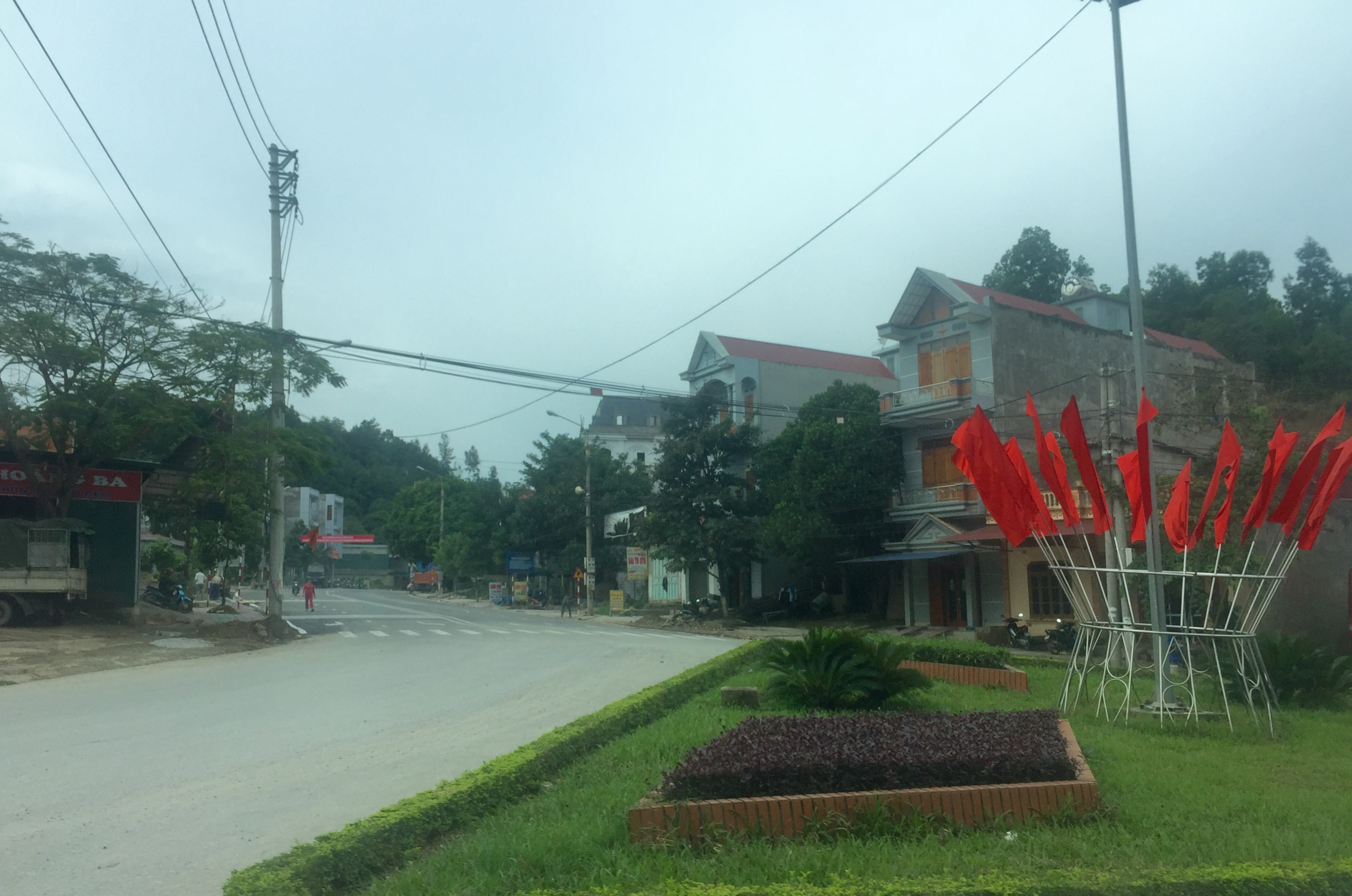 Phùng Chí Kiên, tp. Bắc Kạn, Bắc Kạn, Vietnam